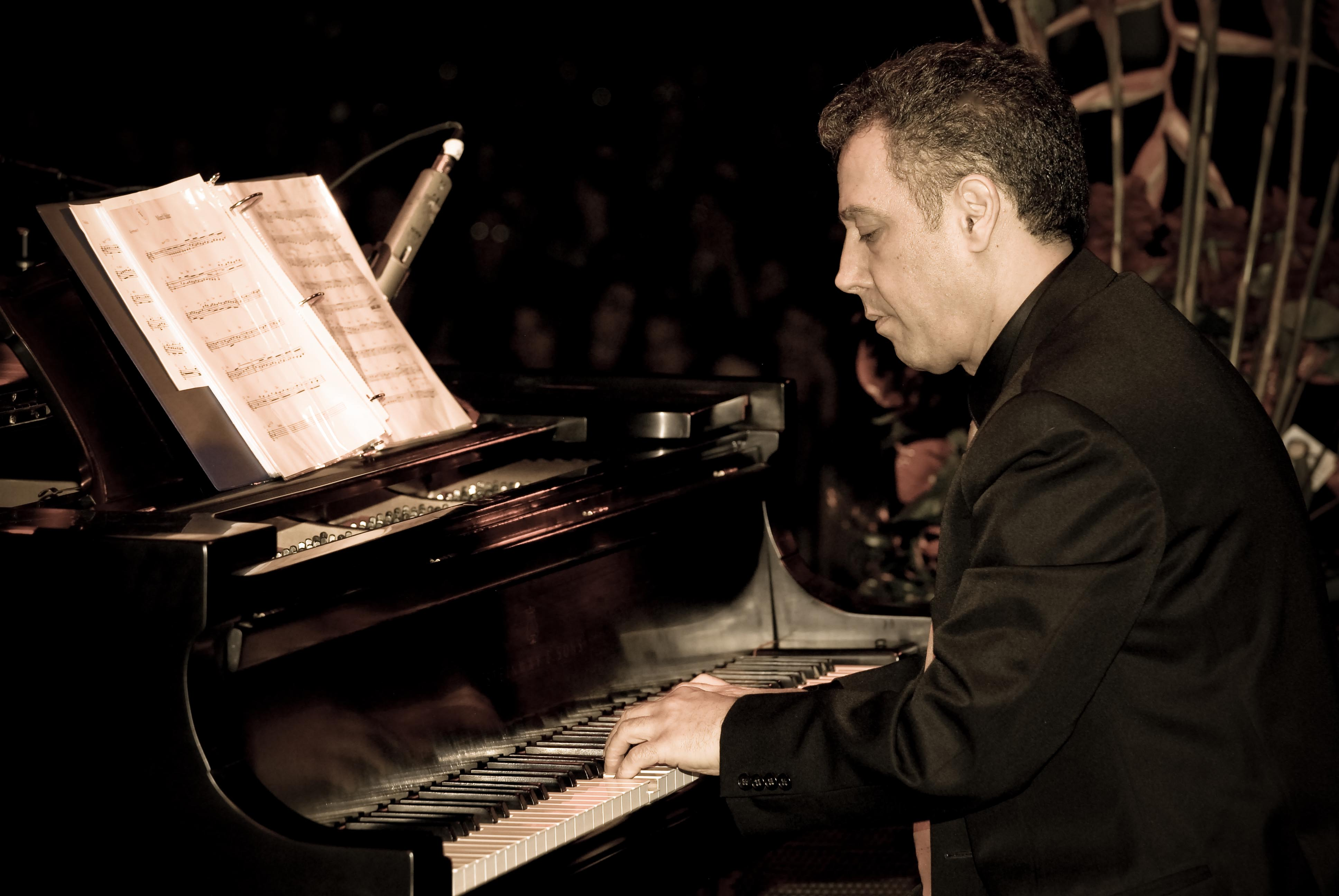 کاظم عالمی آهنگ ساز و تنظیم کننده مطرح ایرانی